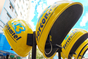 Telefone público da Sercomtel